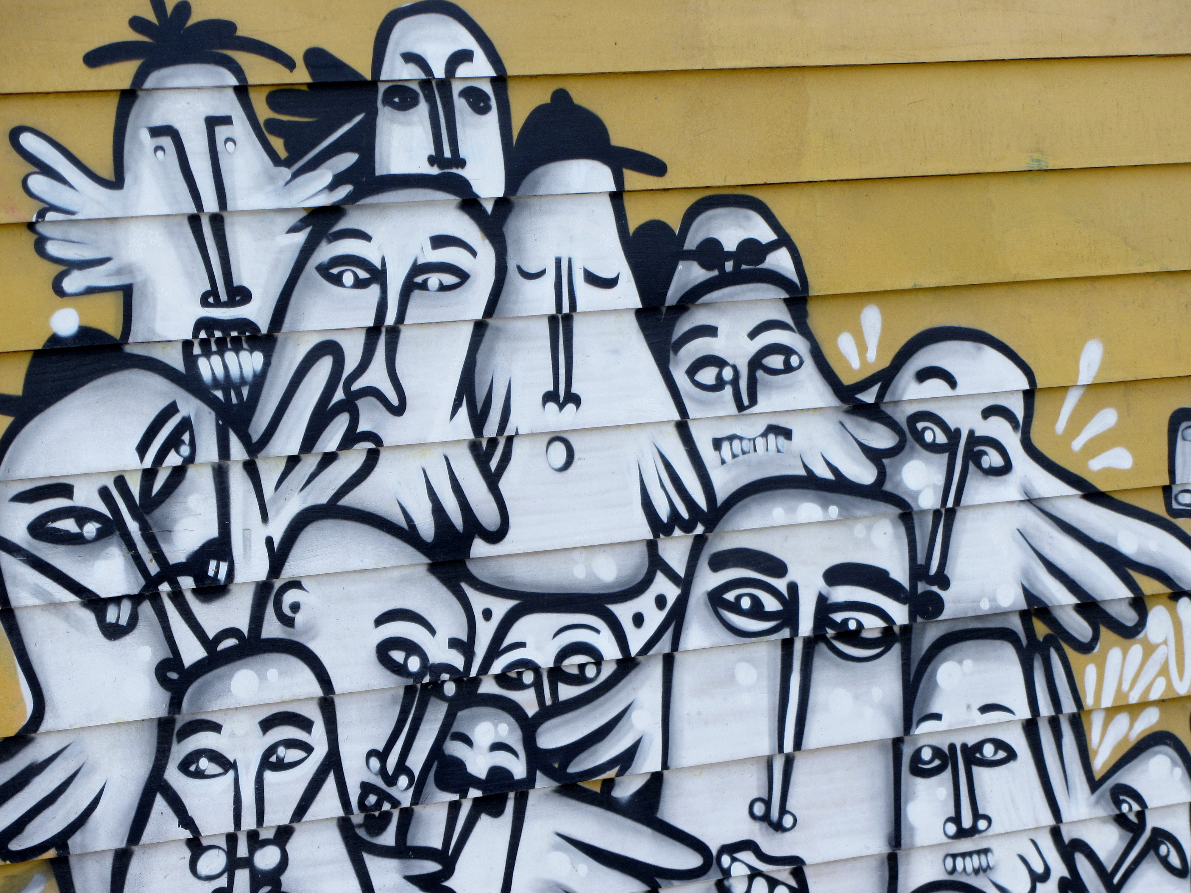 Pajarones, grafiti pintado en una pared de la estación superior del ascensor Reina Victoria por Unkolordistinto recreando los personajes del caricaturista Lukas (Renzo Pecchenino) en la plazoleta Lukas.